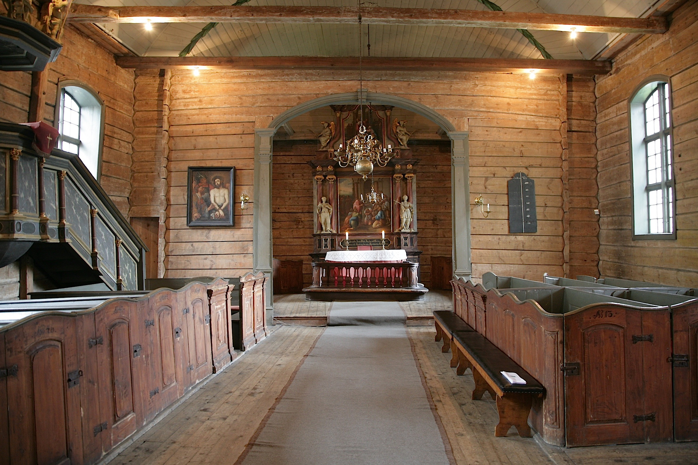 Sankt Jørgen kirke, Bergen